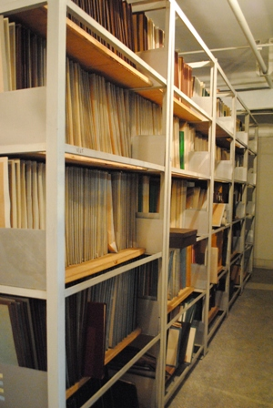 ხელნაწერთა ეროვნული ცენტრის საცავი